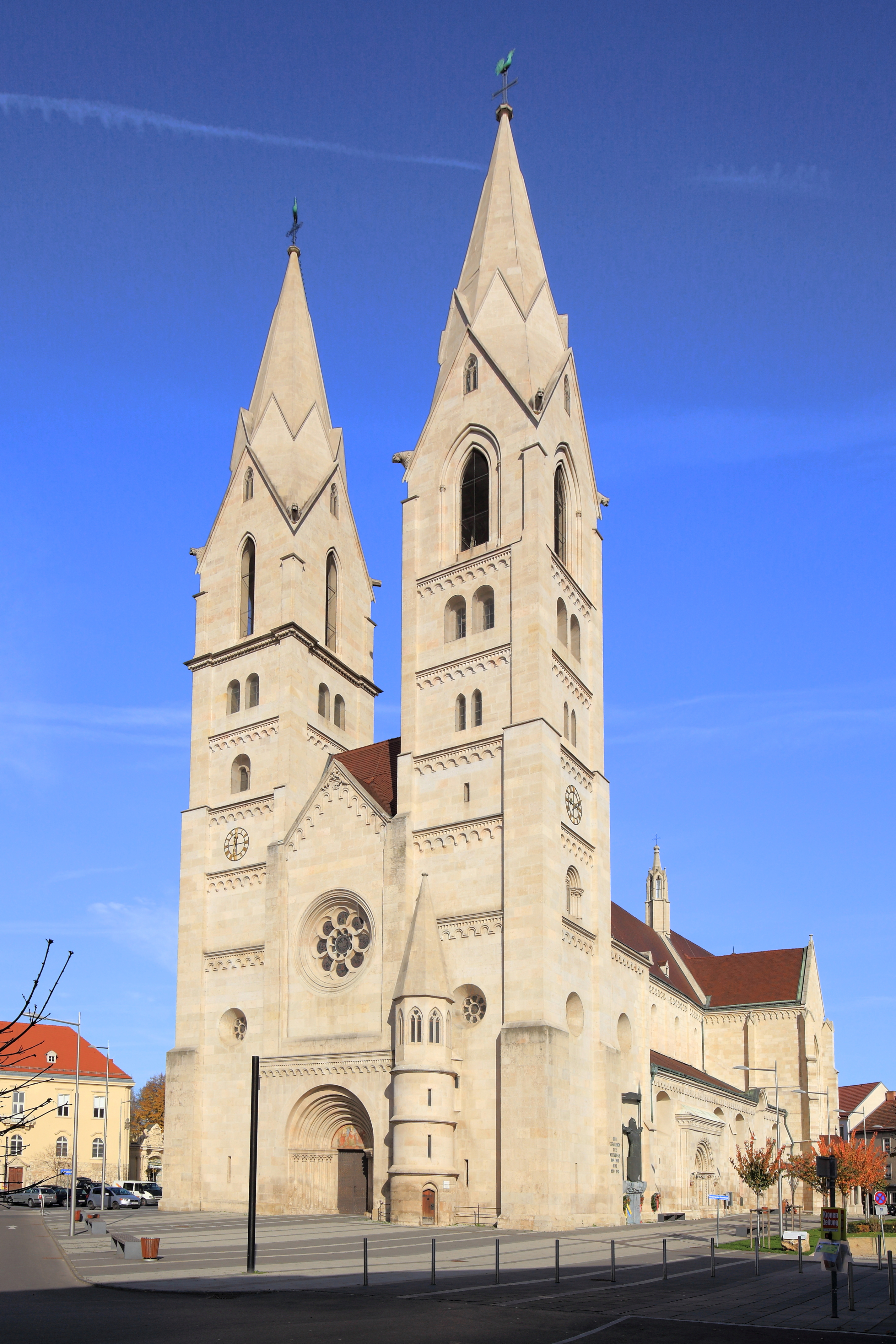 Südwestansicht des Domes in der niederösterreichischen Bezirkshauptstadt Wiener Neustadt.Das Langhaus mit dem Westturmpaar wurde von 1193 bis 1279 im spätromanischen-frühgotischen Stil errichtet. Im ersten Viertel des 14. Jahrhunderts wurde das Querschiff und der polygonale Chor mit den Seitenchören sowie eine zweigeschossige Sakristei im Norden errichtet. Unter Kaiser Friedrich III. erfolgten im 15. Jahrhundert Umbauten und eine Neuausstattung. Unter Bischof Ferdinand Graf von Hallweil wurde 1755 der Dom barockisiert. Nach einem Brand 1834 in der Glockenstube wurden die baufälligen Türme 1886 abgetragen und nach den alten Plänen unter der Leitung des Wiener Architekten Richard Jordan von 1892 bis 1899 wieder aufgebaut.